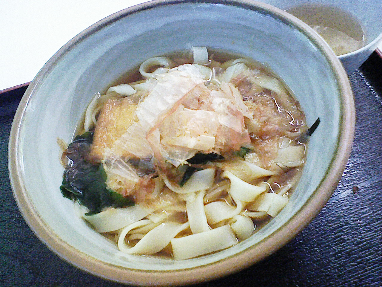 きしめん（名古屋市）